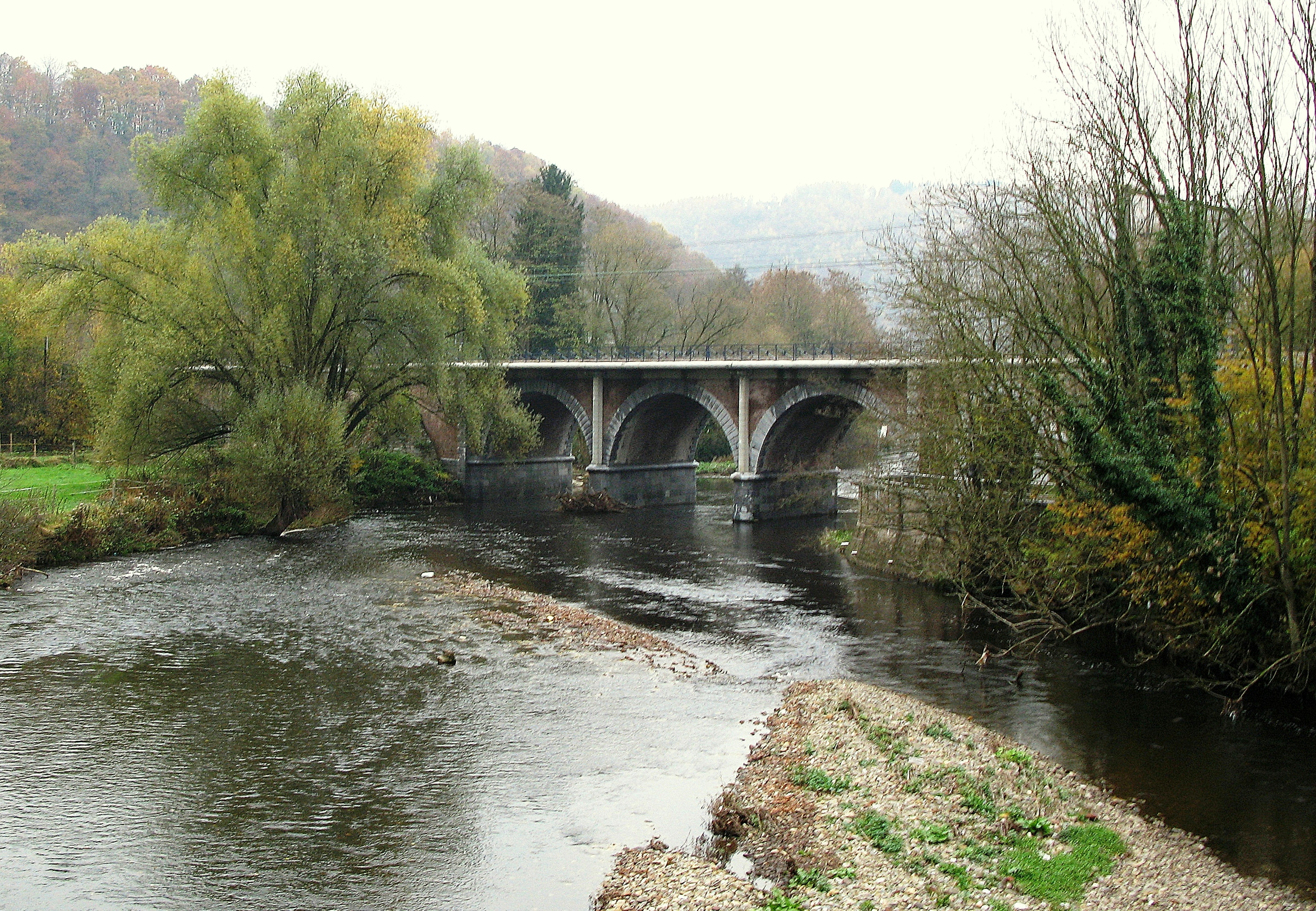 D'Weser zu Goffontaine ënner der Eisebunnsbréck